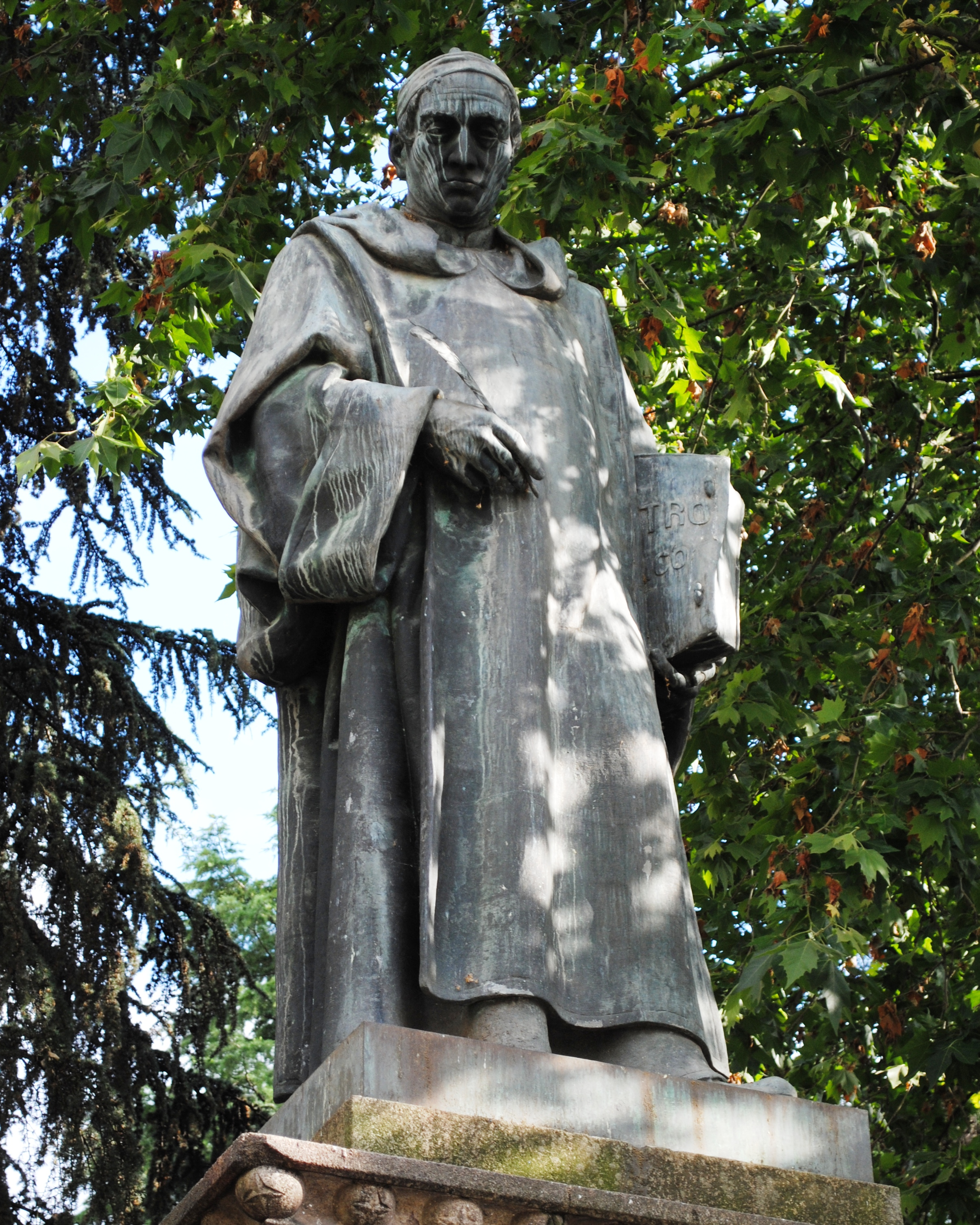 see title